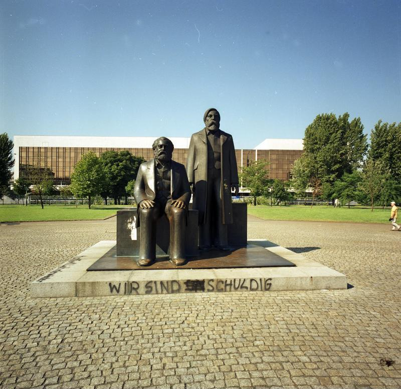 22.7.1991 Berlin-Mitte Marx-Engels-Denkmal vor dem Palast der Republik